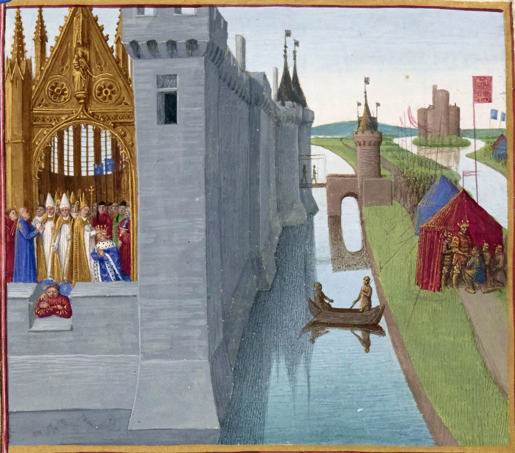 Couronnement de Louis VI le Gros. Henri Ier Beauclerc et les envoyés français Grandes Chroniques de France, enluminées par Jean Fouquet, Tours, vers 1455-1460. Paris, BnF, département des Manuscrits, Français 6465, fol. 183 (Livre de Louis VI le Gros) Couronnement de Louis VI le Gros : Le 3 août 1108, à Orléans, Louis VI le Gros est couronné par Daimbert, archevêque de Sens, en présence des prélats et des barons du royaume. Henri Ier Beauclerc et les envoyés français (sur la droite) : En 1109, lors des démêlés au sujet du château de Gisors qui eurent lieu entre Louis VI le Gros et le roi d'Angleterre, Henri Ier Beauclerc, ce dernier reçoit devant sa tente les envoyés du roi de France. La rencontre a lieu à Neaufles-Saint-Martin, au confluent de l'Epte et de la Levrière.